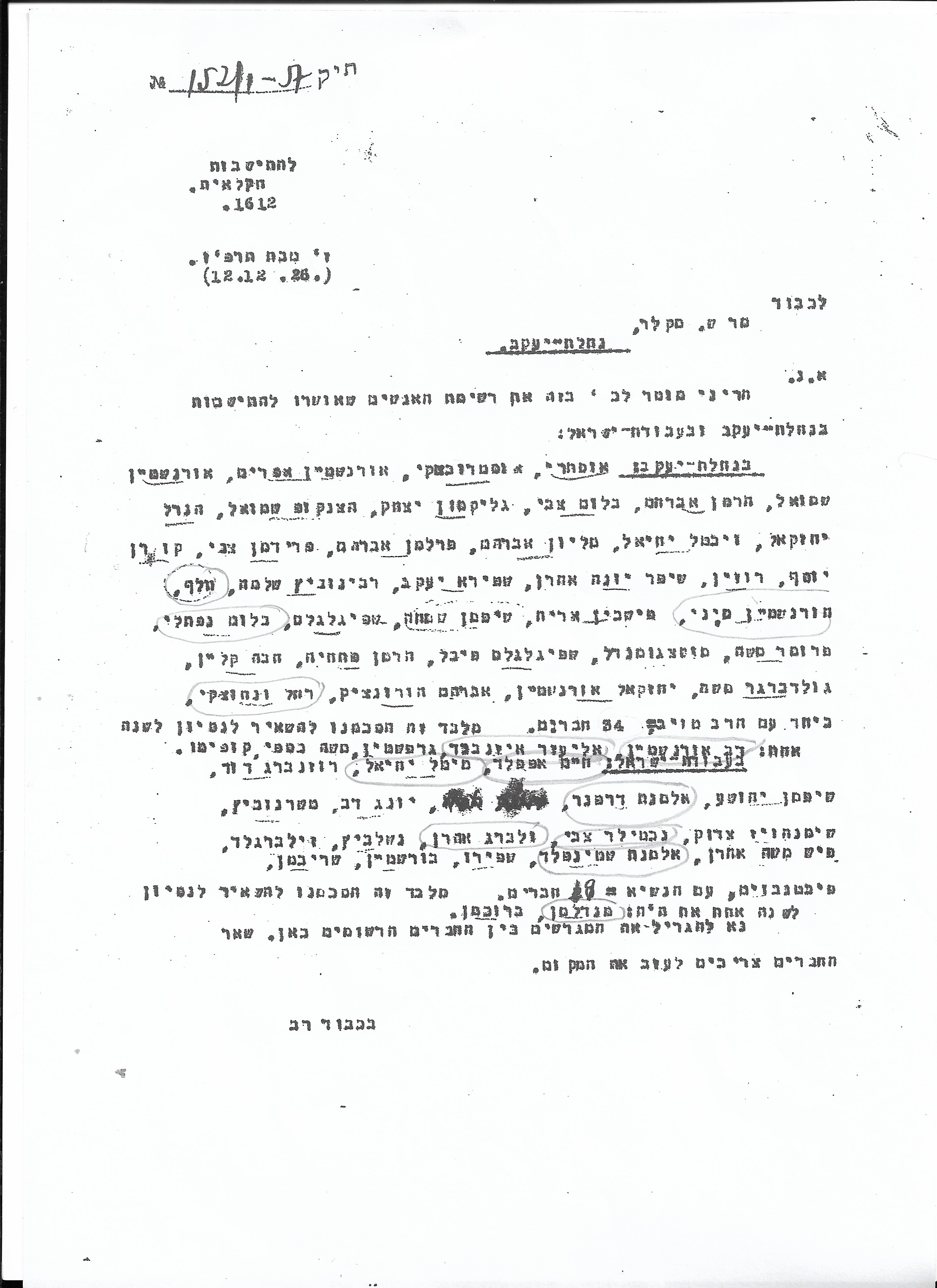 מכתב מיום 12/12/1926 של המחלקה להתיישבות של הסוכנות היהודית.